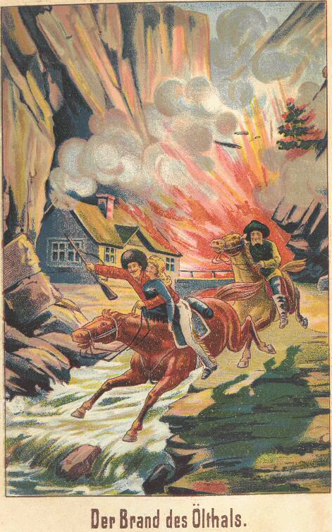 Der Brand des Oeltals